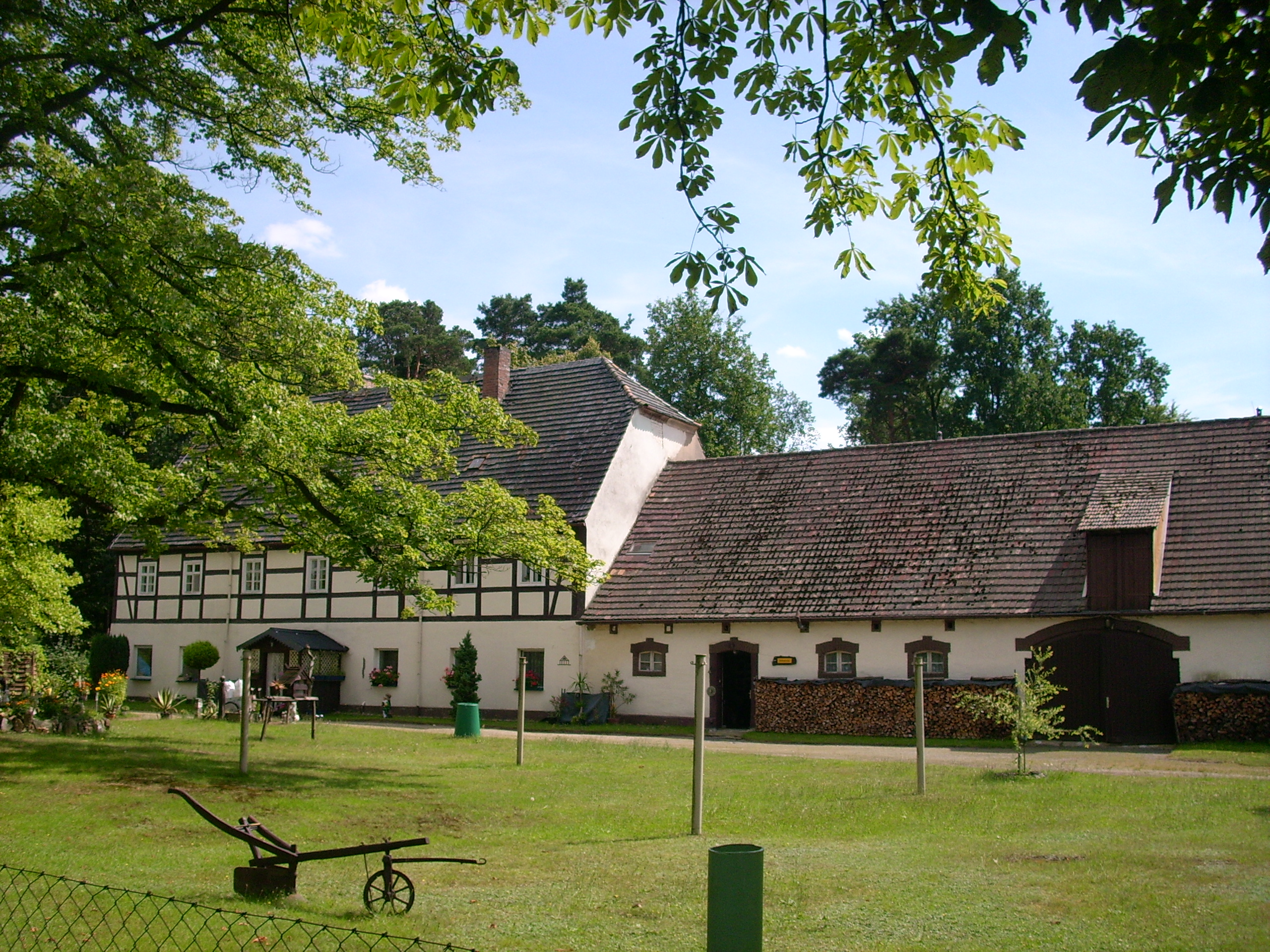 Wohnstallhäuser, Kastanienweg in Hermsdorf/Spree, Ortsteil von Lohsa